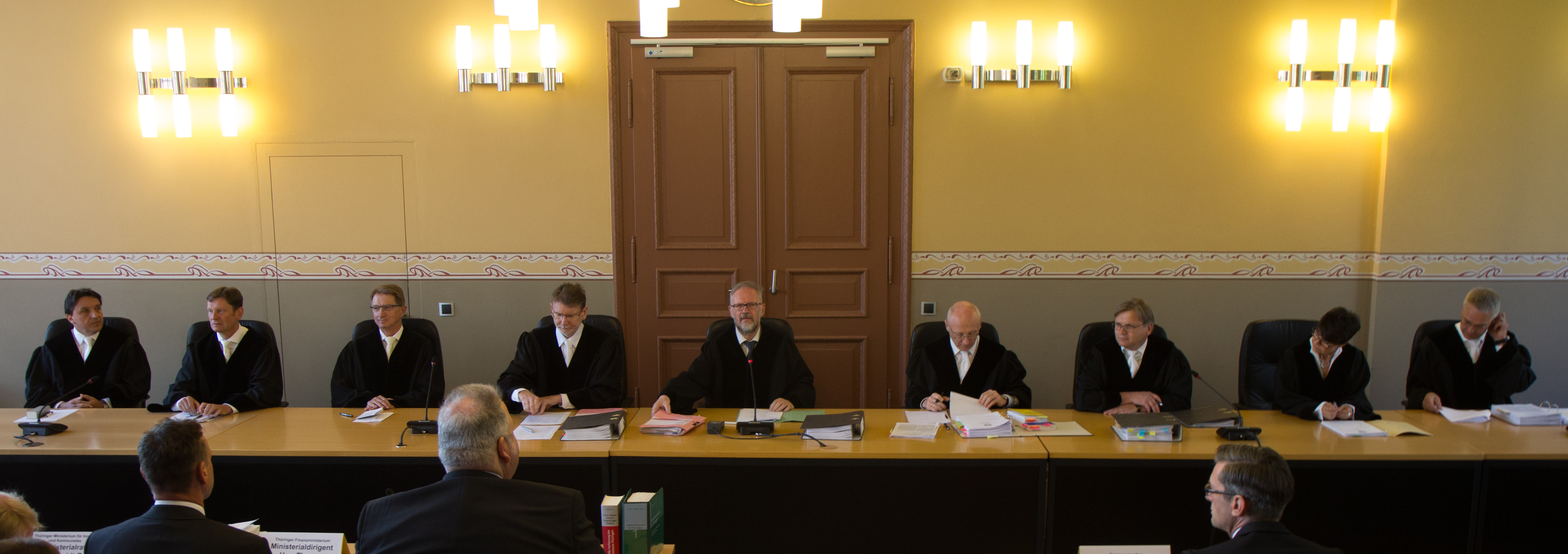 Thüringer Verfassungsgerichtshof. Öffentliche Sitzung am 14. Juni 2017 in Weimar